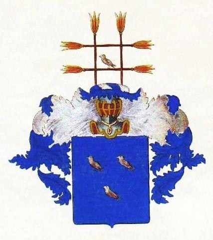 Familienwappen der (von) Sperling (Mecklenburger Uradel).